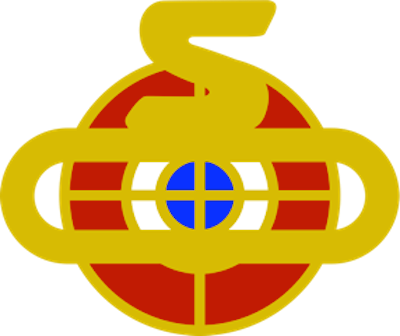 Logo for Snarøen Curling Club